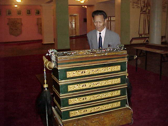 Монгол: B. Sumiyabaatar, Монгол Улсын Төрийн Ордонд залсан цорын ганц хувь "Монголын Нууц Товчоон"ы дэргэд